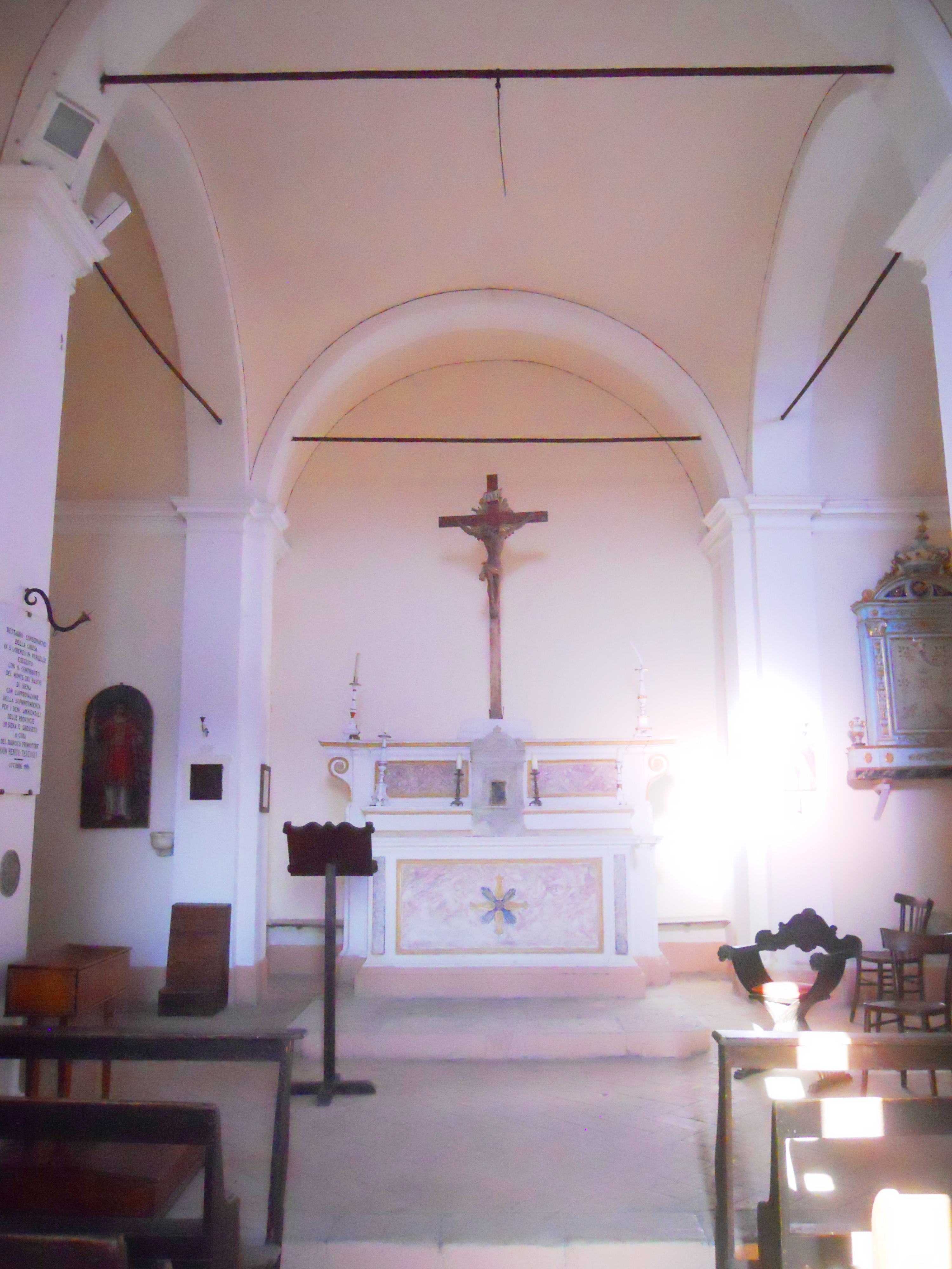 L'interno a croce latina della chiesa di San Lorenzo Martire a Vergelle.